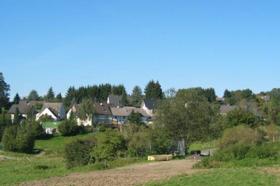 Ortsansicht von Wirtenbach Nachbarort von Breitewiese (Gemeinde Nümbrecht) Kamera: Canon Power Shot S45